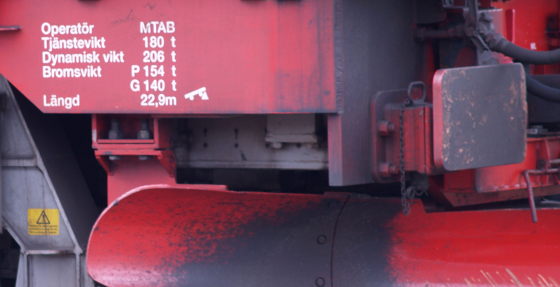 Der Puffer einer IORE Lokomotive.